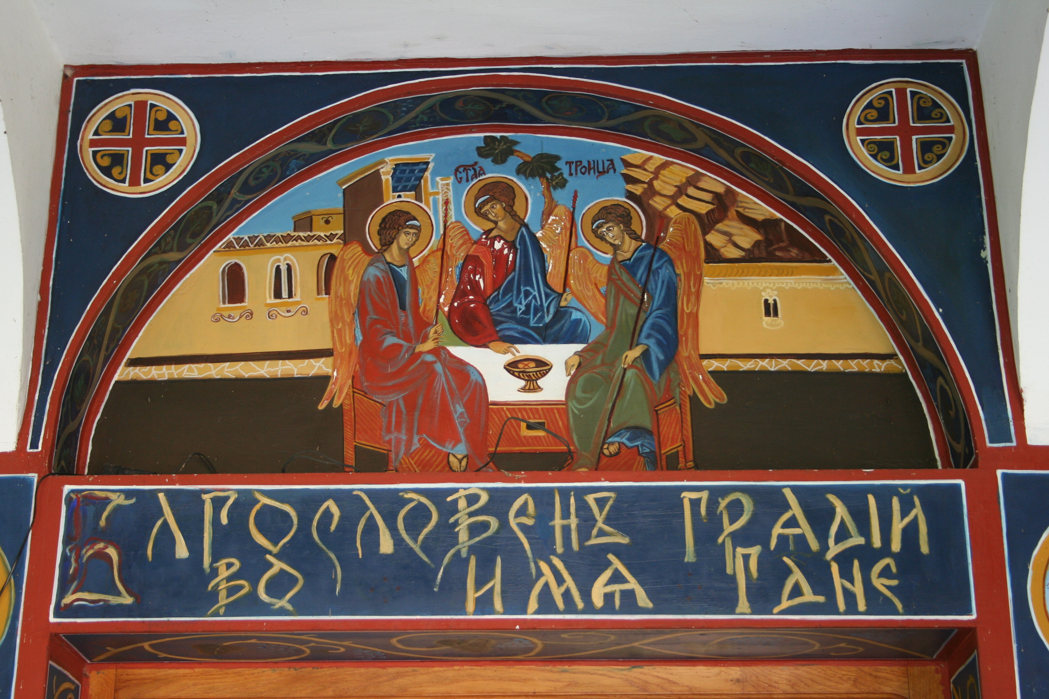 Manastir Bjele vode